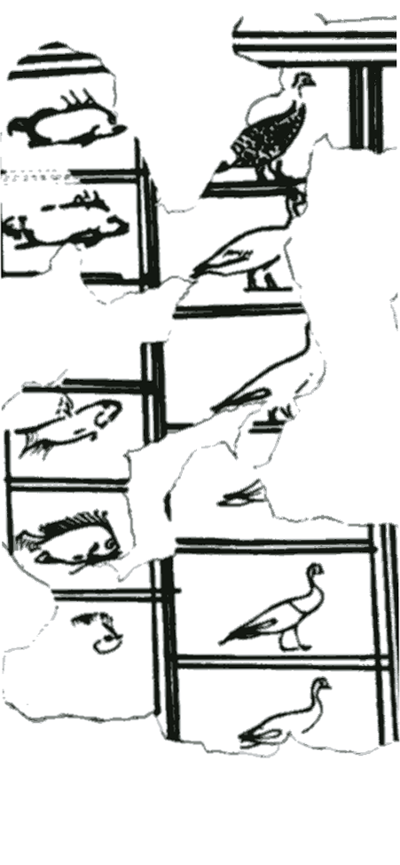 Detail from the giza writing board/detail aus der schreibtafel des mesdjeru aus Gizeh